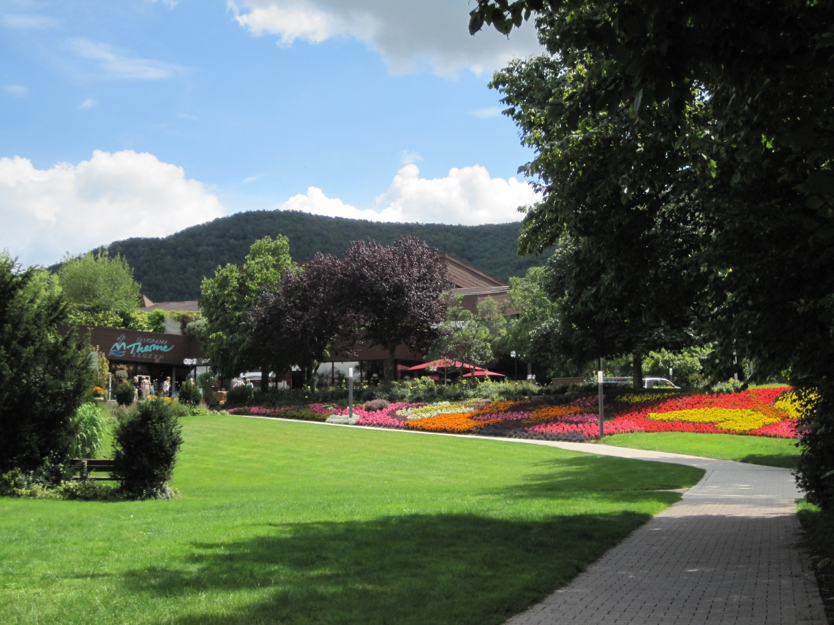 Eingangsbereich der Panoramatherme in Beuren